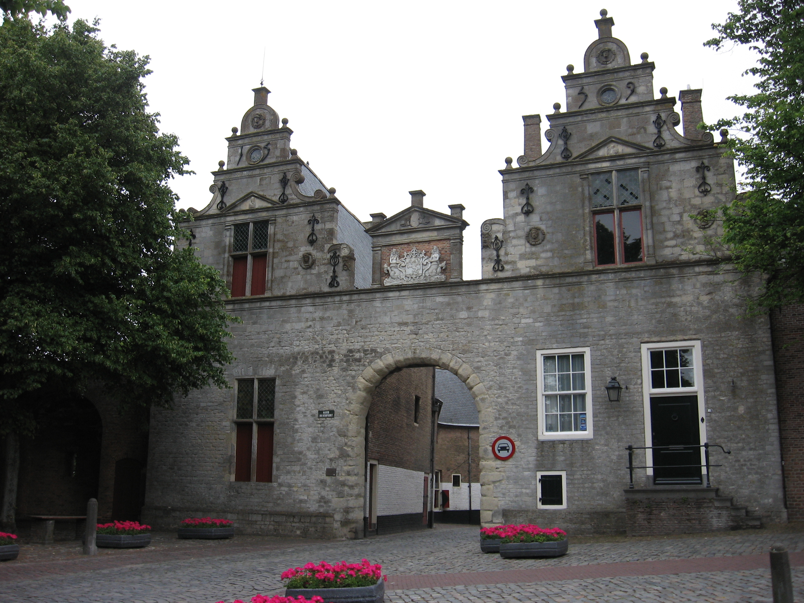 Zicht op een deel van de Noordhavenpoort nabij de haven van Zierikzee